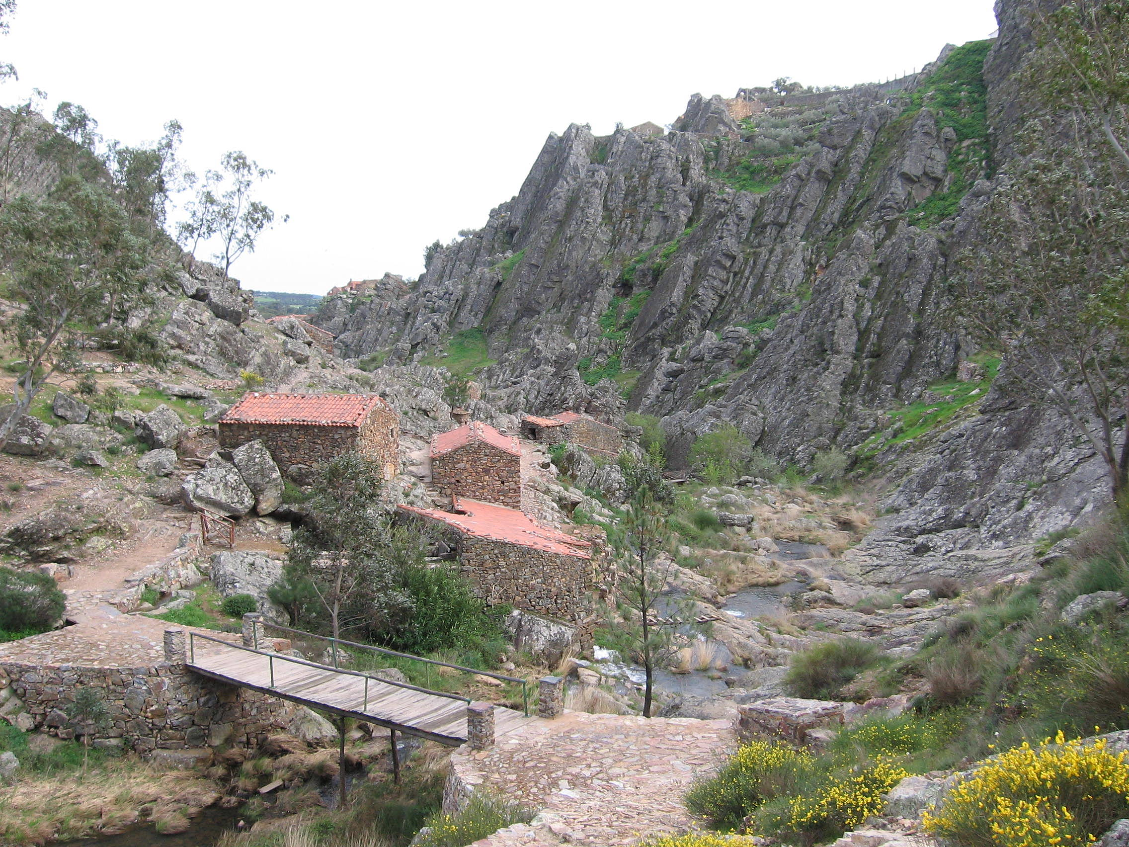 Vale do Pônsul a montante de Penha Garcia, Idanha-a-Nova